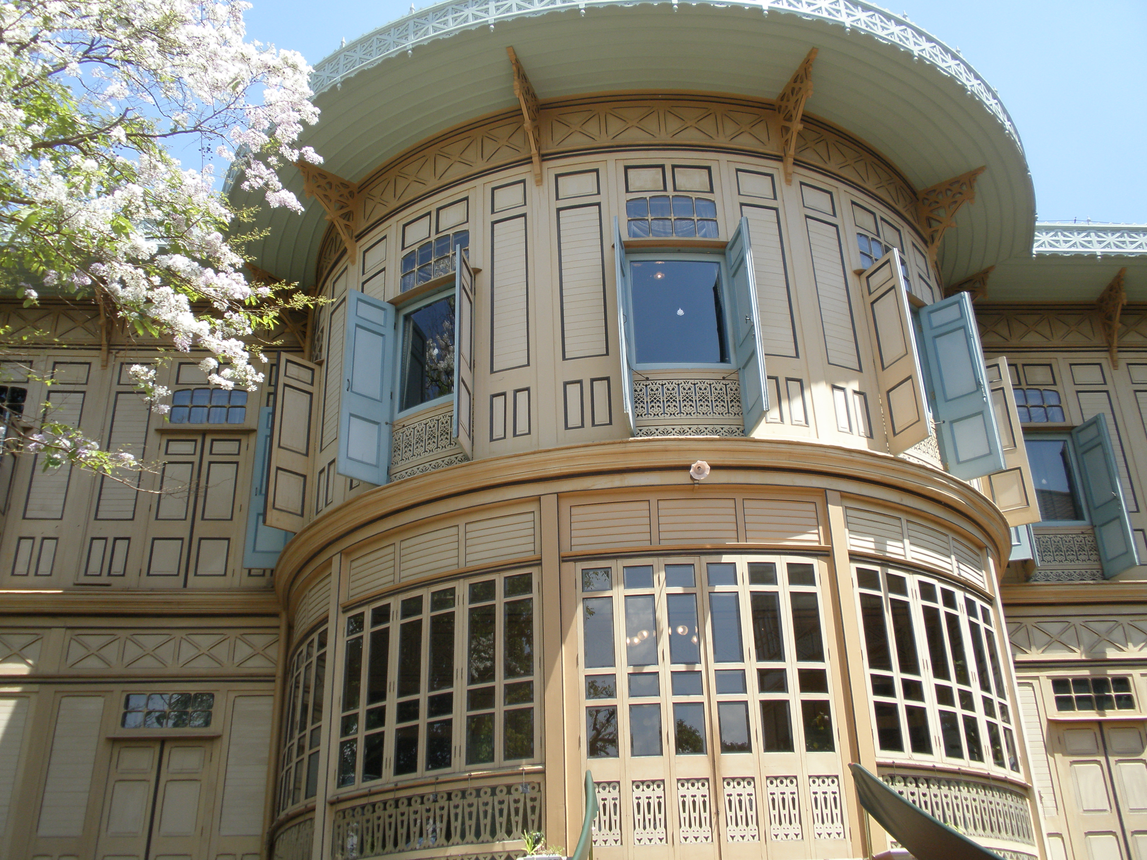 Partie de la façade du Palais céleste, le palais Vimanmek à Bangkok